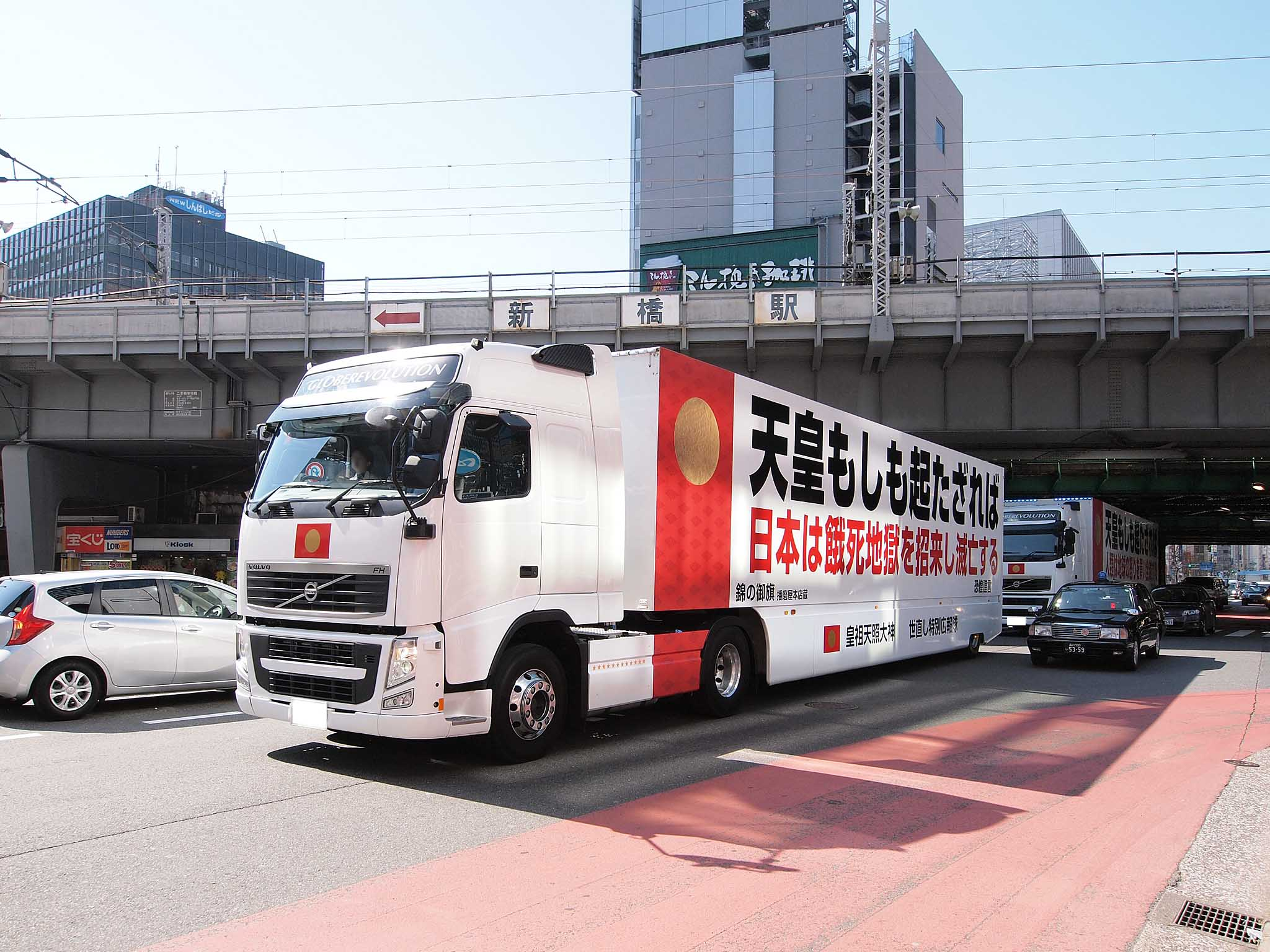 播磨屋本店「世直し特別広報隊」のボルボ・FH。日本政府や皇室に対するメッセージが大書されたトレーラーを牽引、複数台で隊列を組んで東京都内の繁華街を運行する。